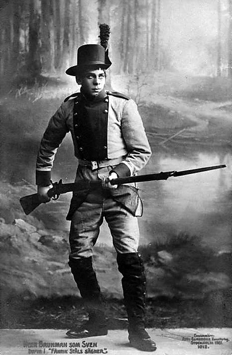 Ernst Brunman (1886-1961)